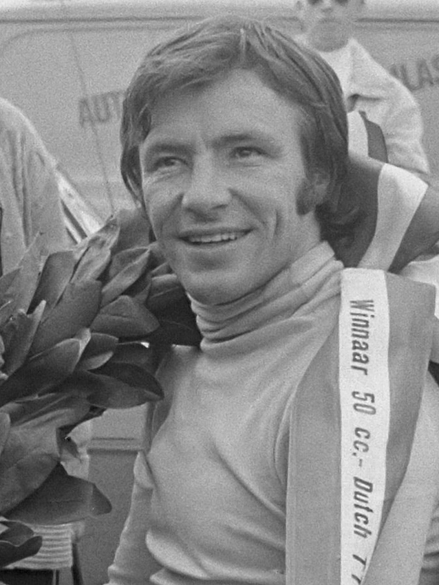 Ángel Nieto con la Derbi 50cc en Assen, 1972